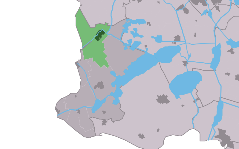 Kaartsje fan himrik fan Warkum